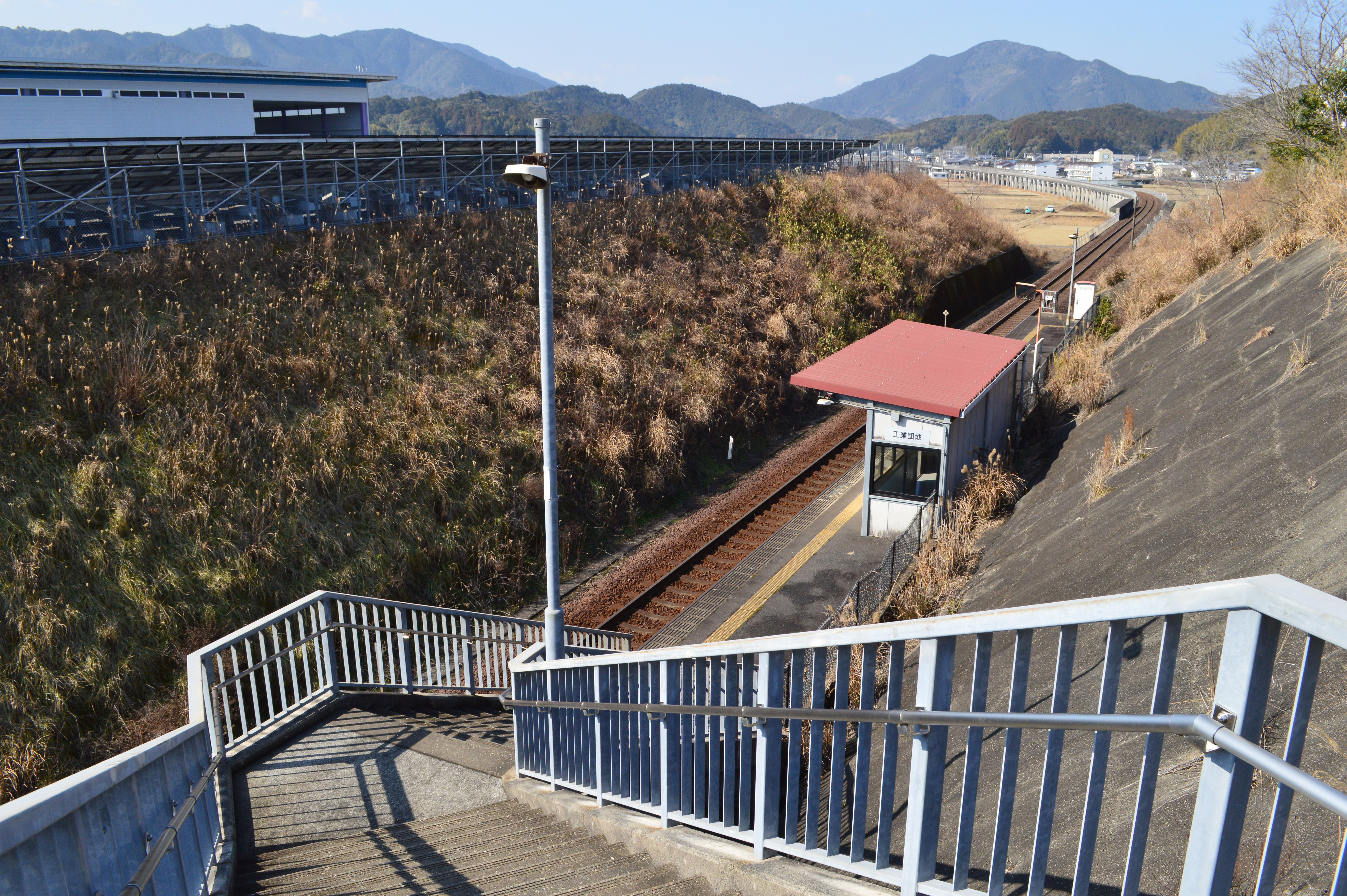 工業団地駅 全景